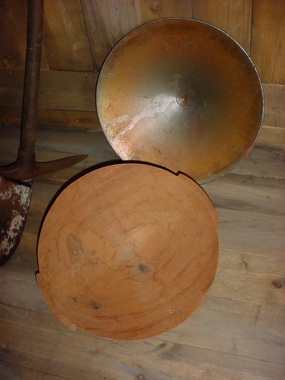 Batées de bois et d'acier utilisées pour la prospection minière et l'orpaillage en France